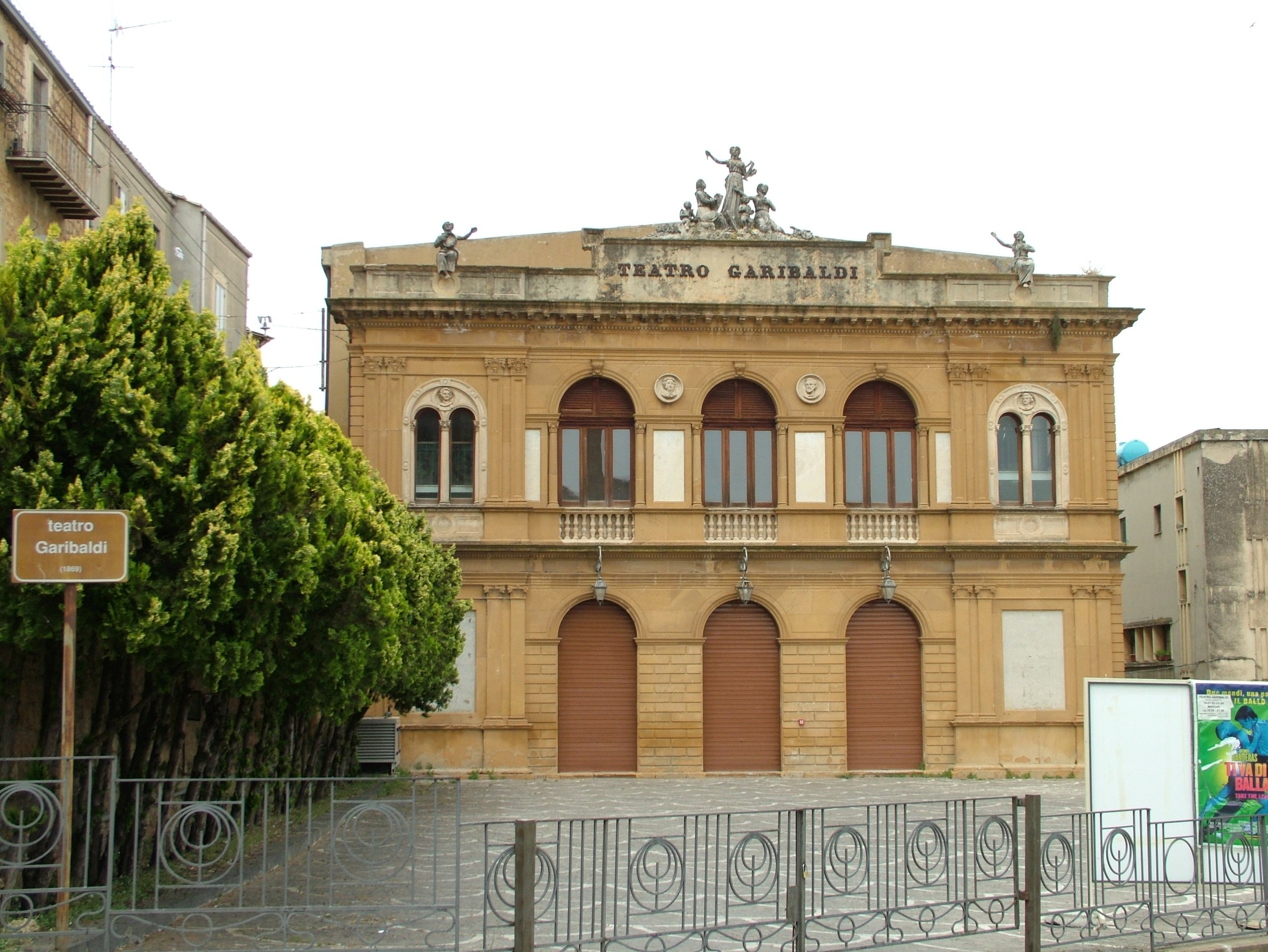 Piazza Armerina, Sizilien, Italien, das Teatro Garibaldi